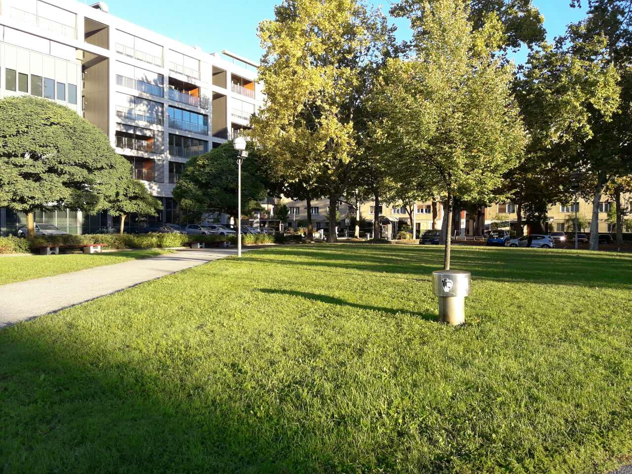 Rakušev Trg v Mariboru fotografiran proti severu.